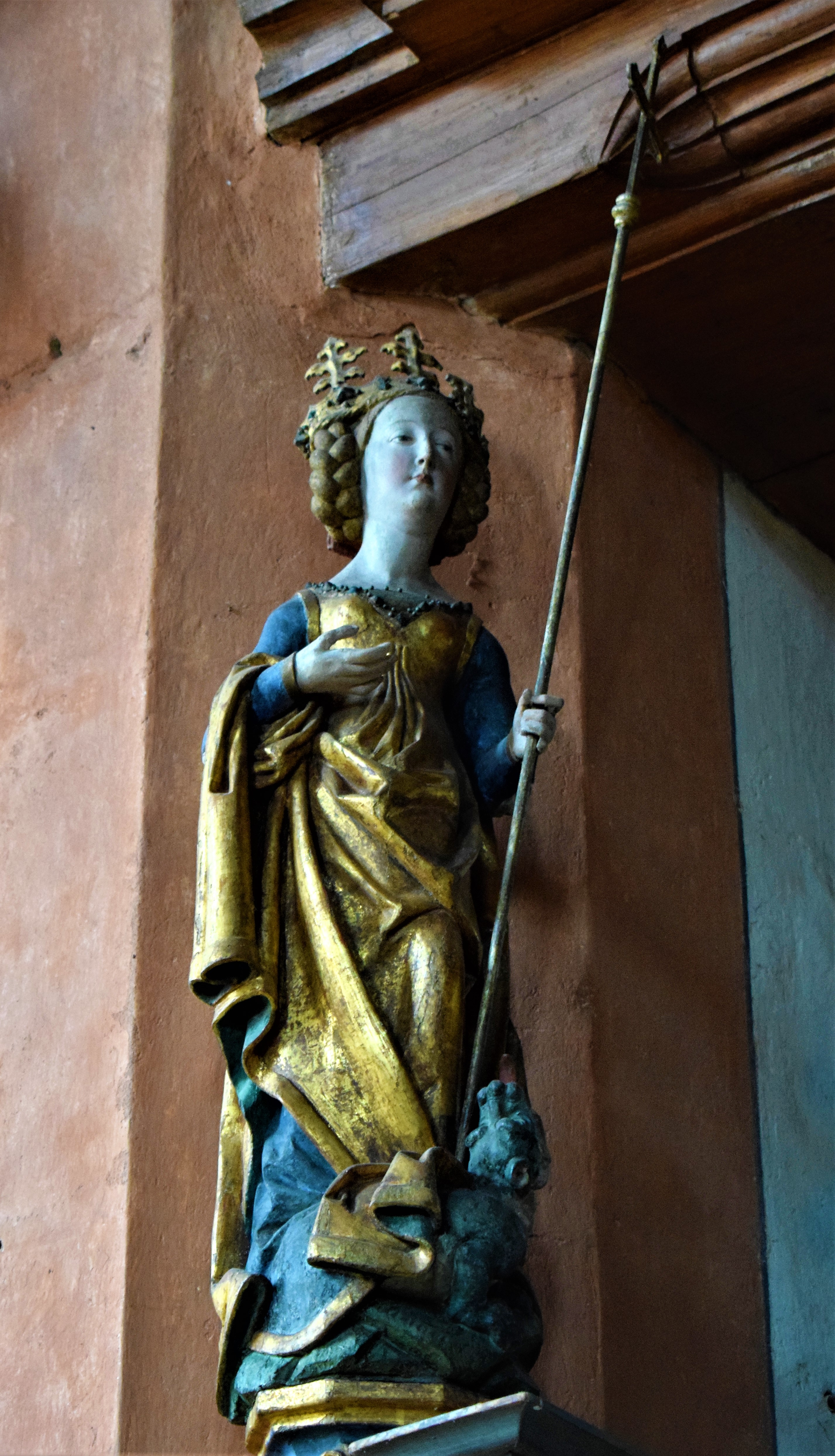 Rieterkirche Kalbensteinberg, heilige Margaretha (um 1500)